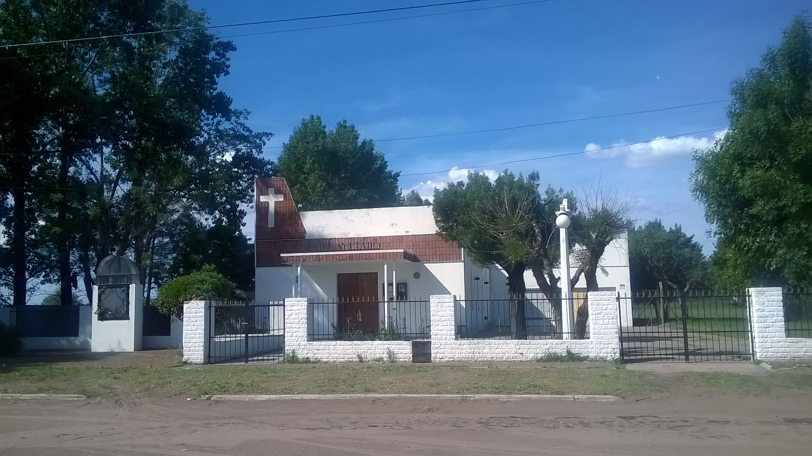 Parroquia catolica San Cayetano ubicado en calle 24 y 115.